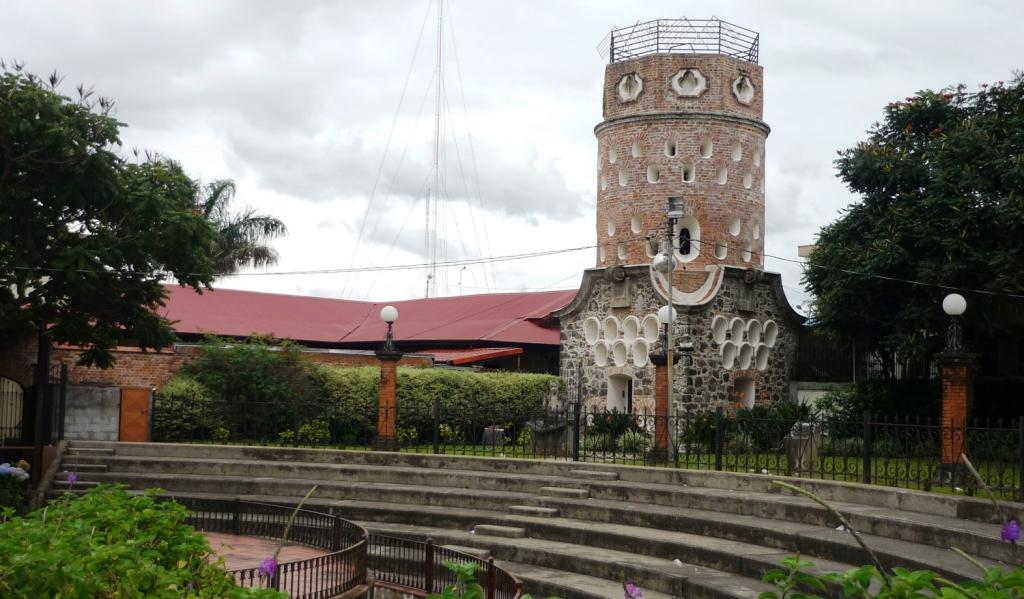 El Fortín de Heredia en 2010 luego de la restauración del 2009. Símbolo de Heredia, Costa Rica y Patrimonio histórico arquitectónico del país.